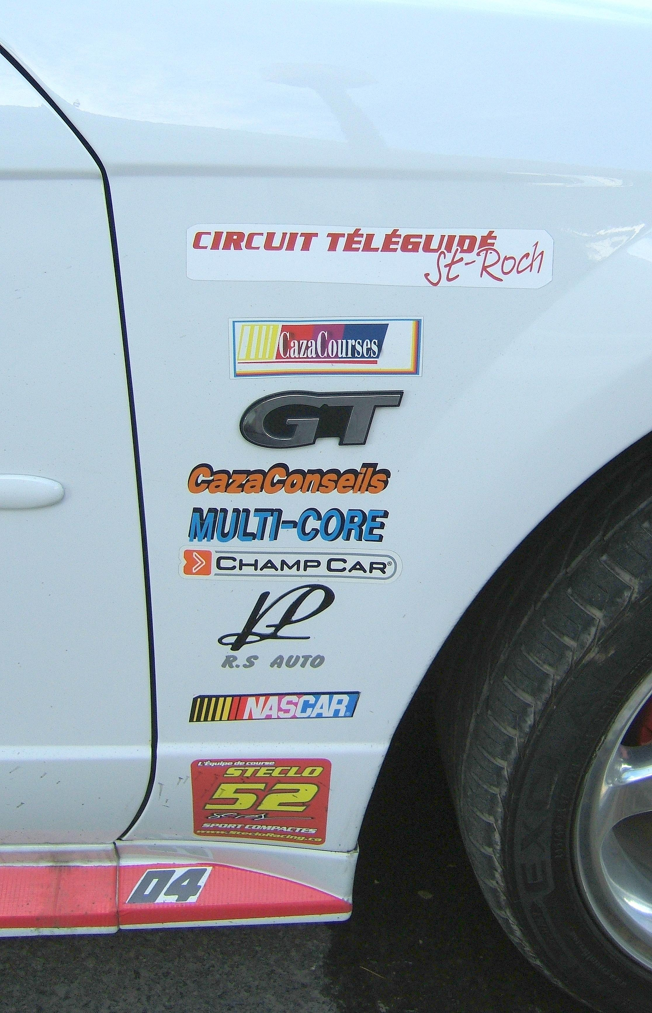 Photo du logo "GT"